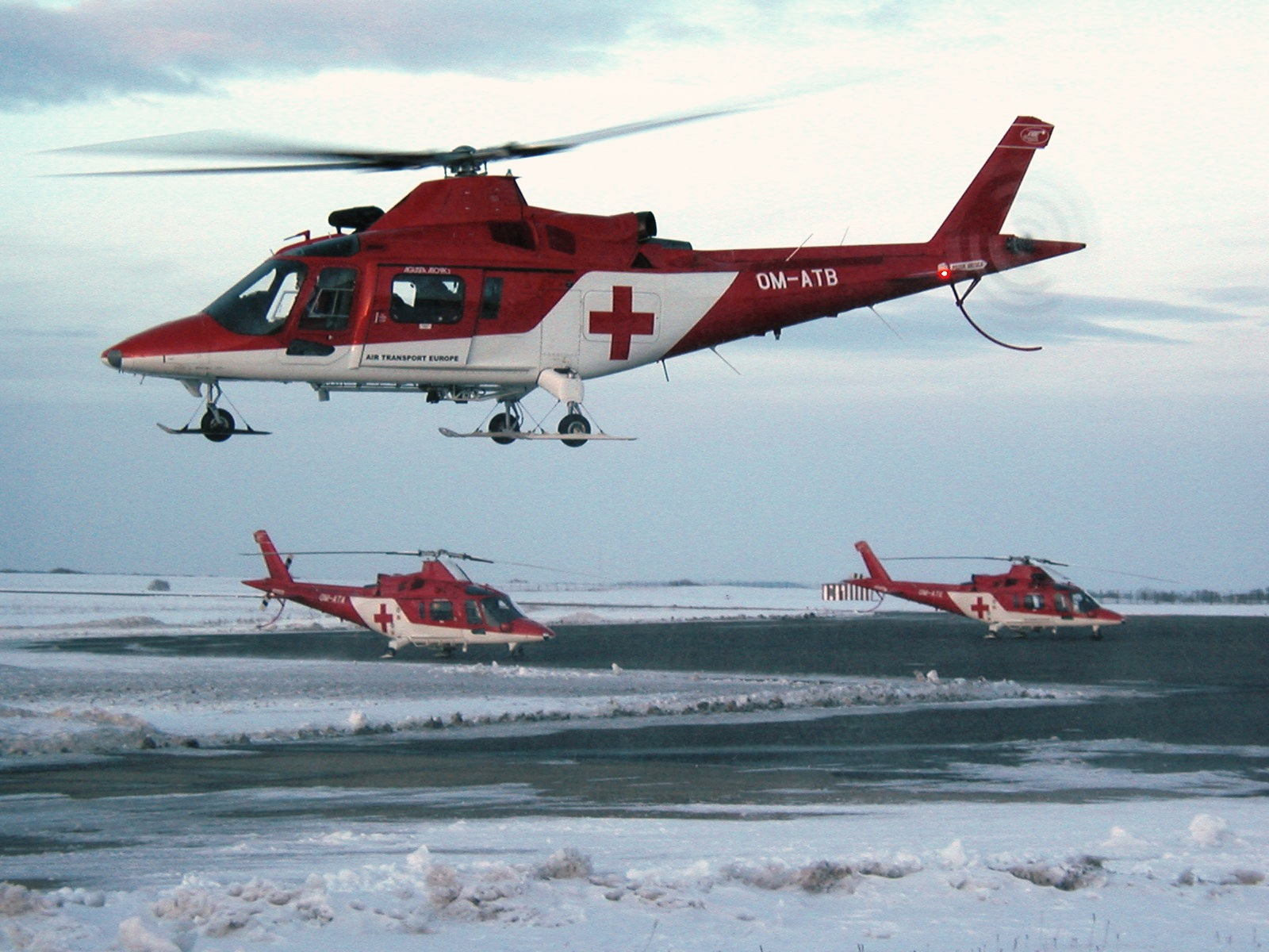 Tri záchranárske vrtuľníky Agusta A109K2 na letisku Poprad - Tatry